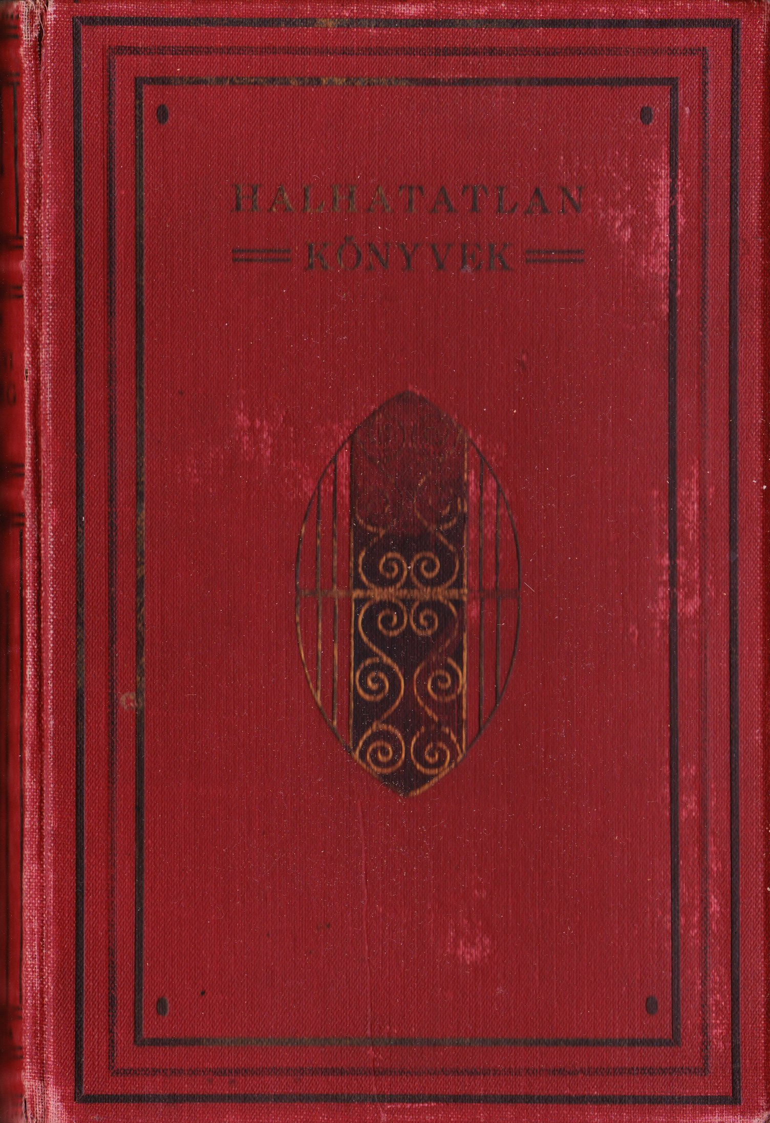 Halhatatlan könyvek könyvborító, 1920-as évek